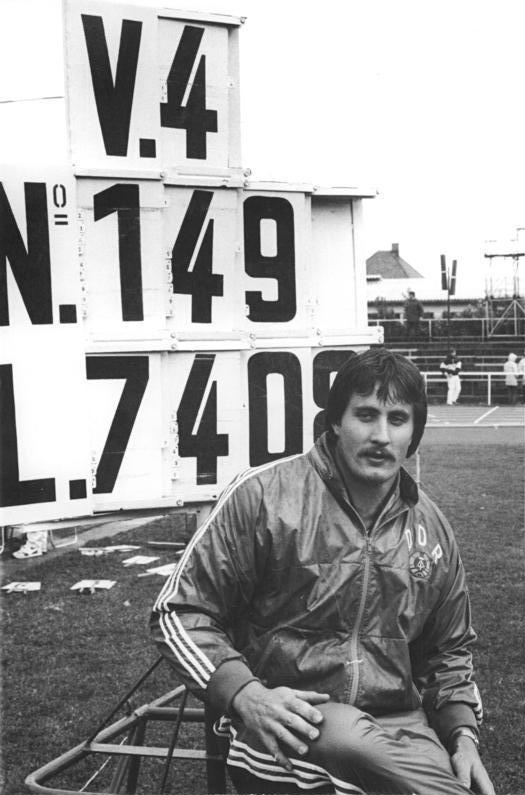 Jürgen Schult ADN-ZB Settnik 8.6.86 Neubrandenburg: Europameisterschafts-Qualifikation der DDR-Leichtathleten- Der 26jährige Schweriner Traktor-Sportler Jürgen Schult nach seinem glanzvollen neuen Weltrekord im Diskuswerfen. Im Neubrandenburger Jahn-Stadion erreichte er am 6.6.86 im vierten Versuch mit 74,08 m eine Weite, die von ihm selbst und auch von den Fachleuten zu dieser Zeit und unter diesen Witterungsbedingungen noch nicht für möglich gehalten worden war.